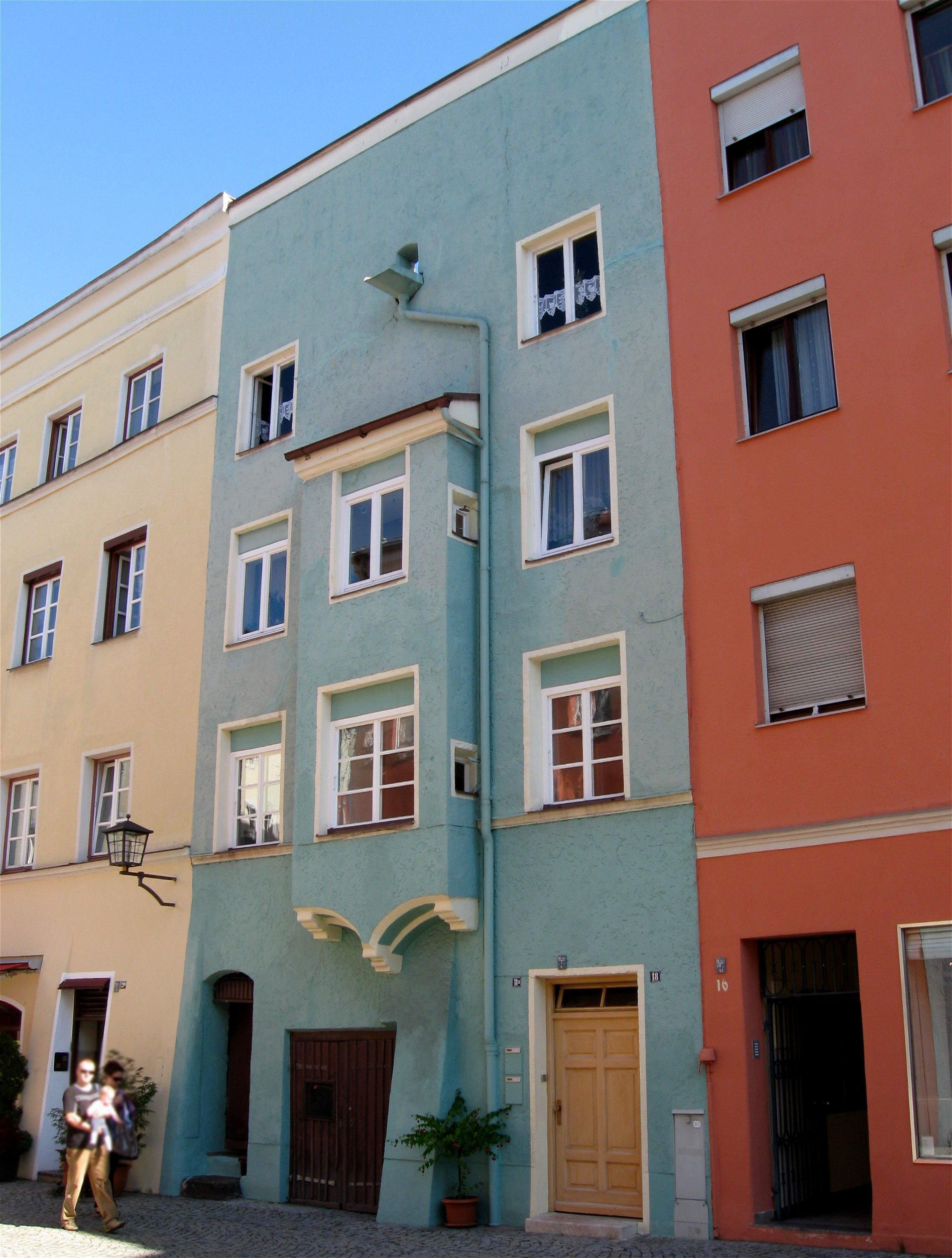 Salzsenderzeile 18, 18a, 18b, 18c. Wohnhaus, dreigeschossig, mit Grabendach und Vorschussmauer, Flacherker über Konsole, wohl noch 1. Hälfte 16. Jh.